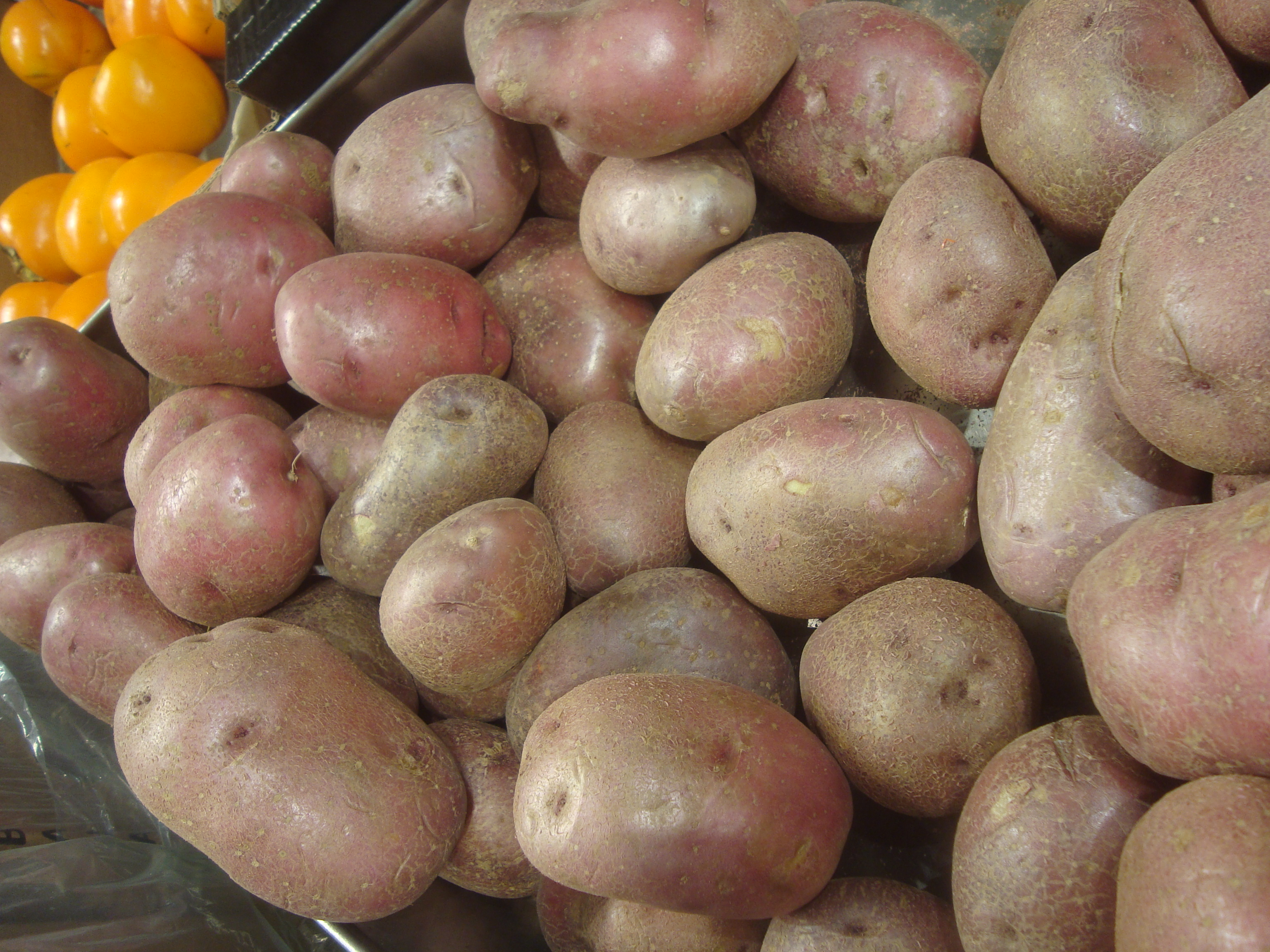 Patatas rojas, origen España.